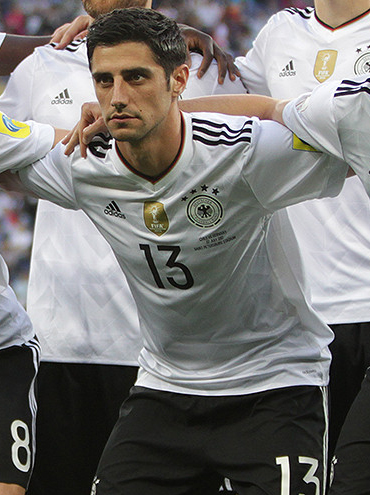 Чили - Германия